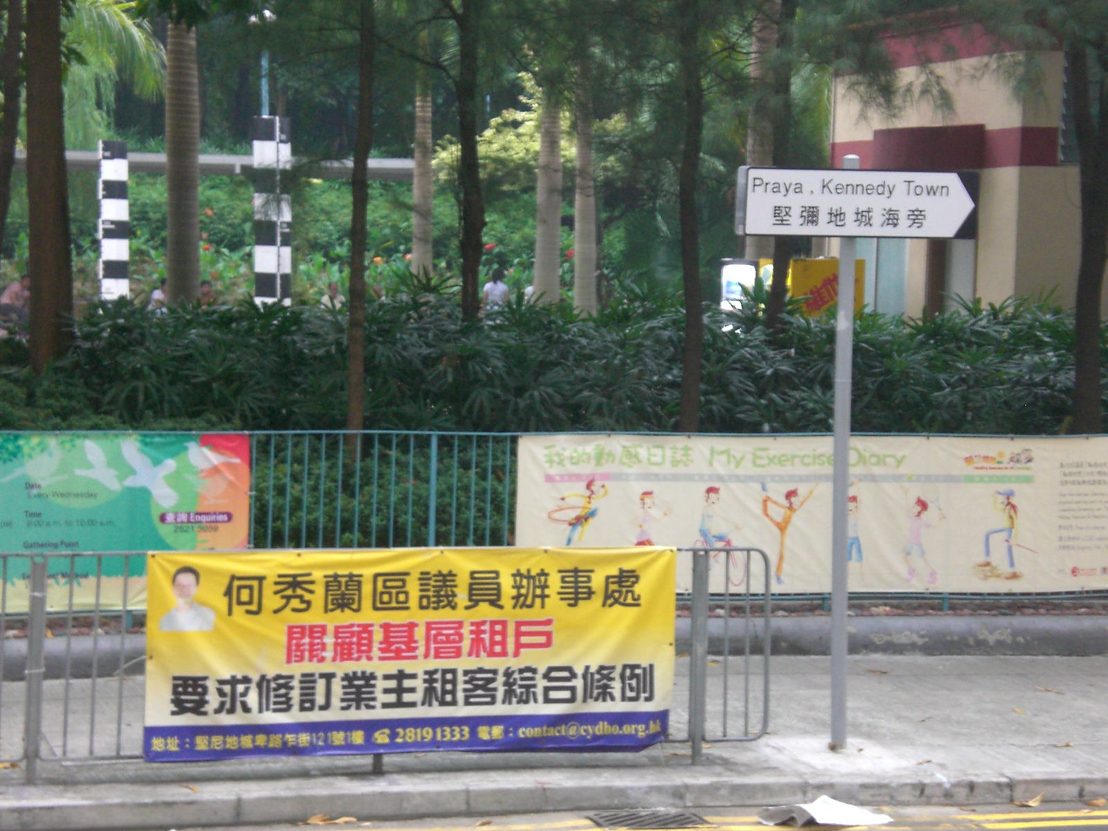 堅彌地城海旁 何秀蘭